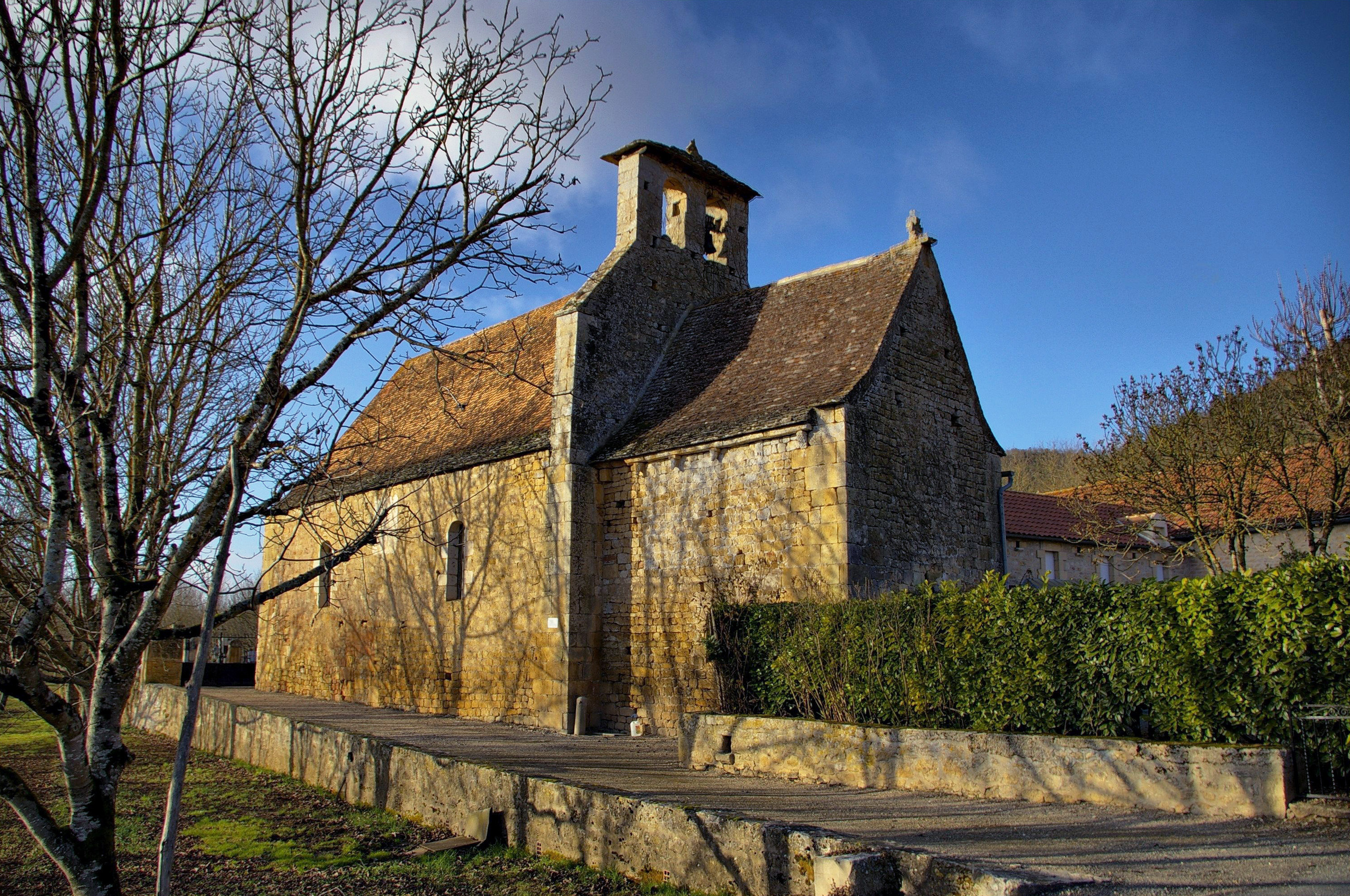 Église Saint-Vincent